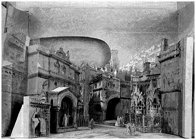 Place de Vérone, décor du tableau 2 de l'acte III. maquette en volume de Eugène Carpezat